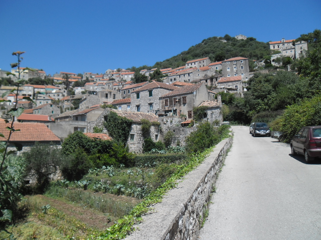 mjesto Lastovo